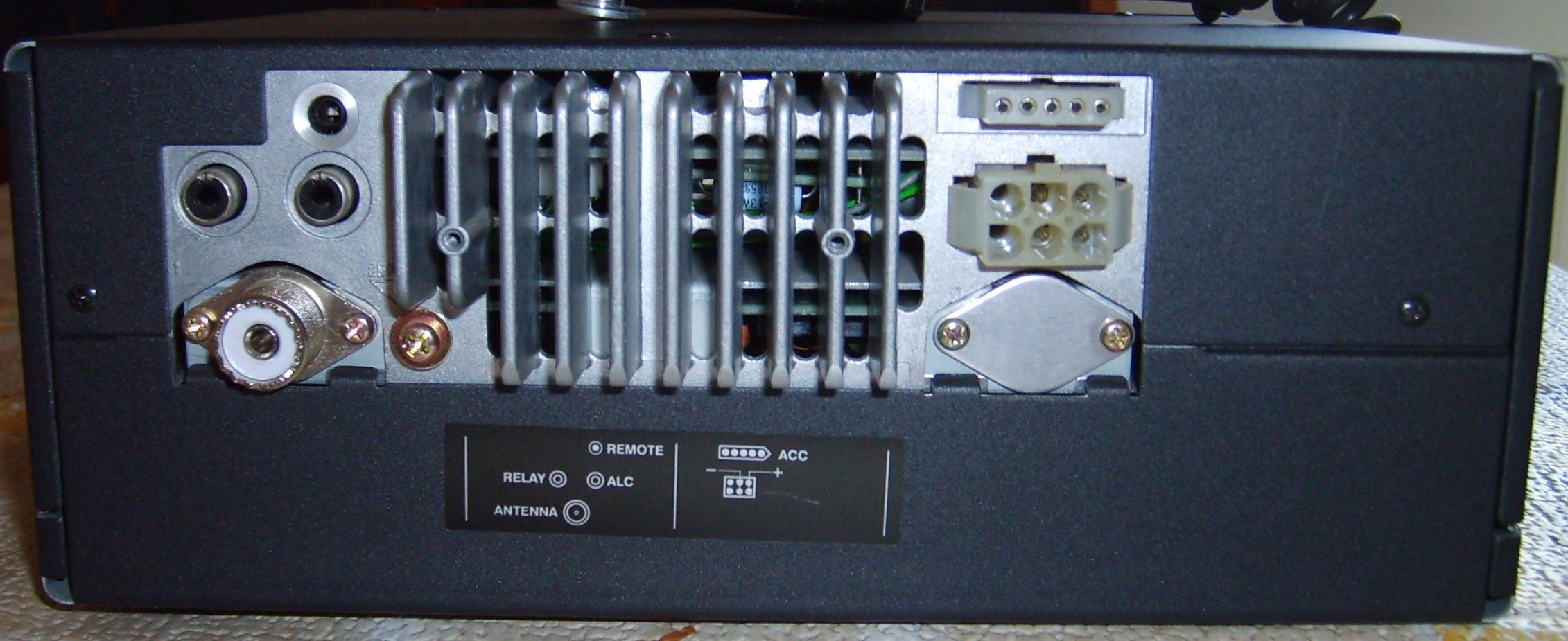 Alinco DX77E